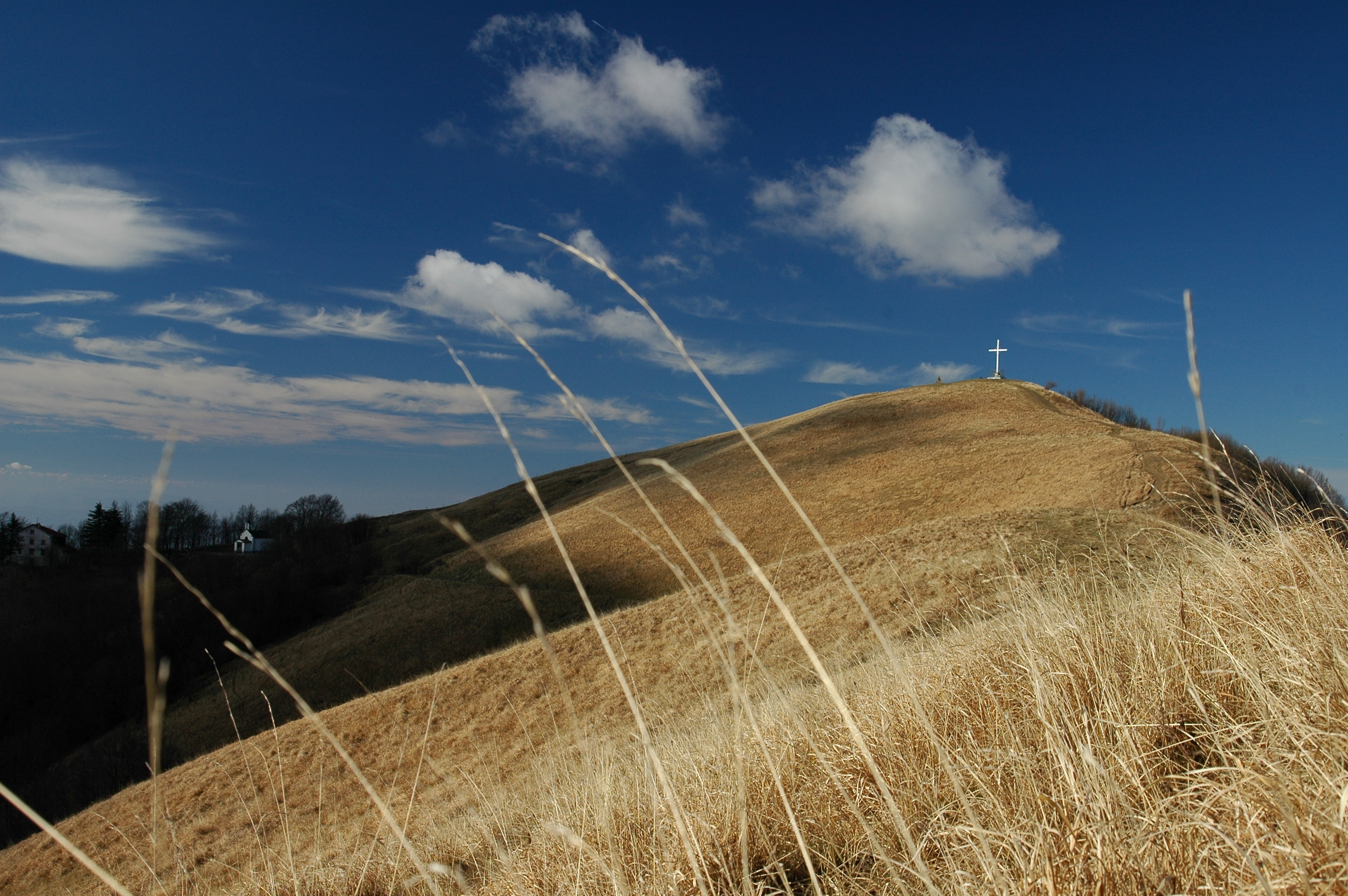 La vetta